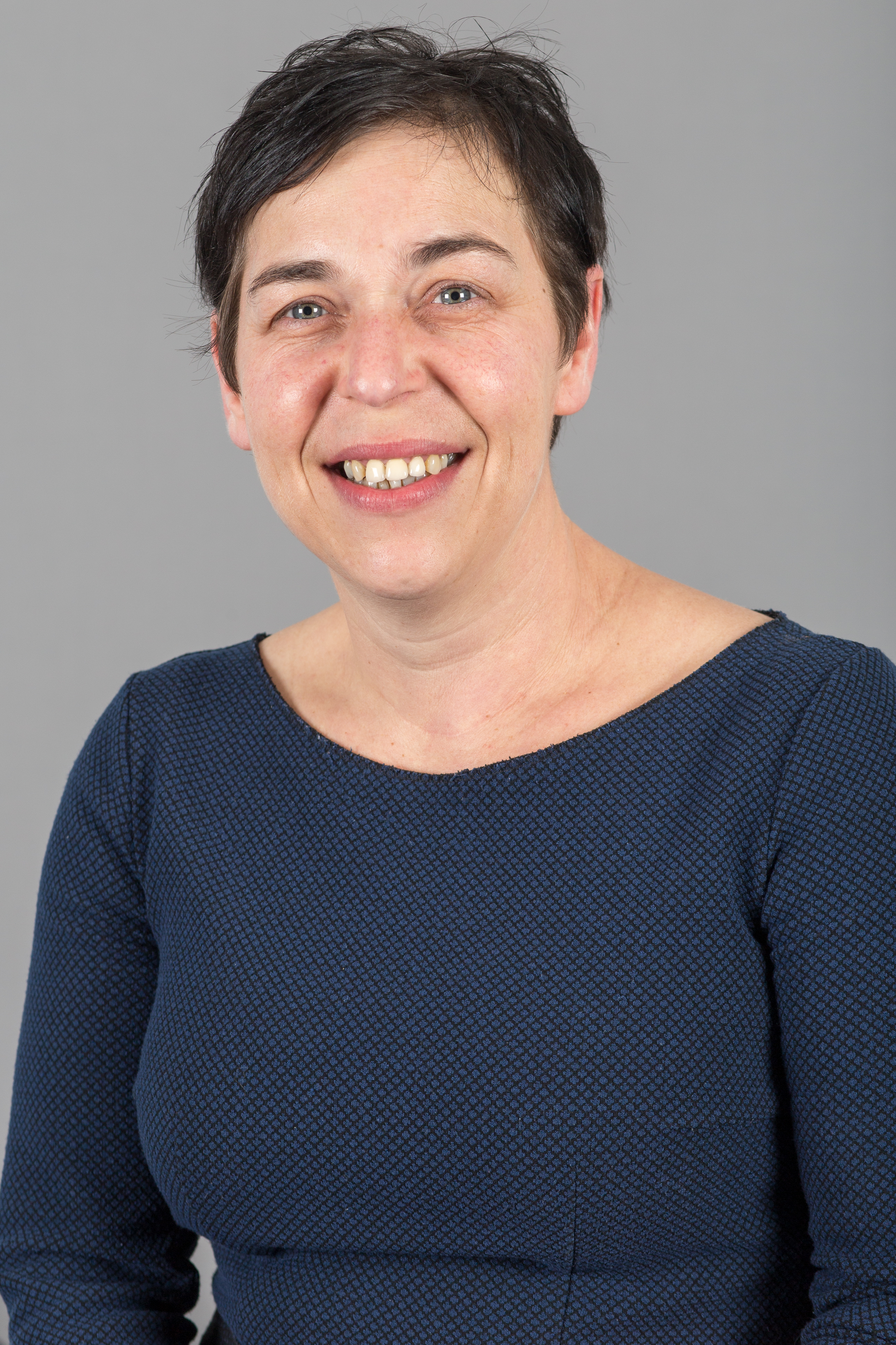 Anja Müller